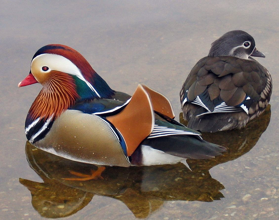 Männliche und weibliche Mandarinente (Aix galericulata); Privataufnahme Georg Mittenecker